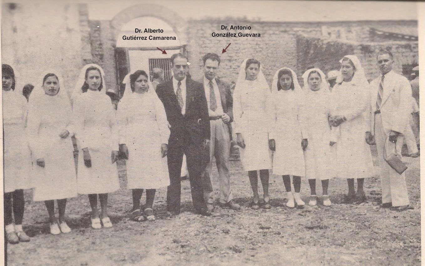 Foto tomada en Tepic, Nayarit; México. El día en que se colocó la primera piedra de lo que fuera el edificio de la Cruz Roja, ubicado por la calle Ures (lo que es hoy el velatorio del DIF). Aparecen los doctores Alberto Guiérrez Camarena y Antonio González Guevara, acompañados de un grupo de enfermeras. Este edificio fue inaugurado el 13 de septiembre de 1947 en un acto solemne, con la asistencia del Gobernador del Estado, don Gilberto Flores Muñoz, su señora esposa y diversos funcionarios gubernamentales; las damas del Comité de la Cruz Roja debidamente ataviadas con el uniforme oficial; un grupo de muchachas estudiantes uniformadas de la Escuela Comercial Roxy con su escolta y abanderada, así como todo el Consejo de Administración. La romántica pero fogosa palabra del ilustre poeta nayarita Everardo Peña Navarro (que era integrante del Consejo de Administración) hizo latir los corazones de todos los presentes y fue un bello grito de aliento para todos los cruzrojistas.